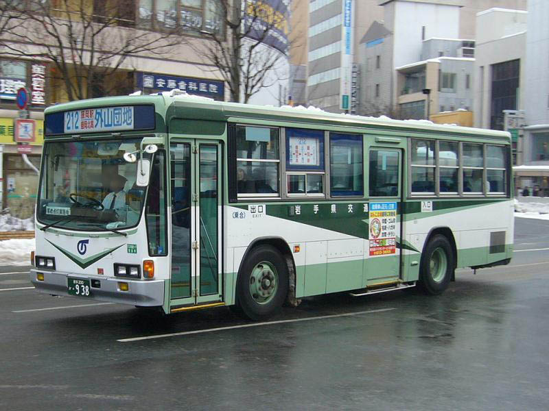 登録番号 岩手200か・938 岩手県交通滝沢営業所所属 元・国際興業所属 国際興業時代の登録番号 練馬22か62-70 2006年1月1日 盛岡駅前にて撮影 撮影者 Tokatsu kokubu